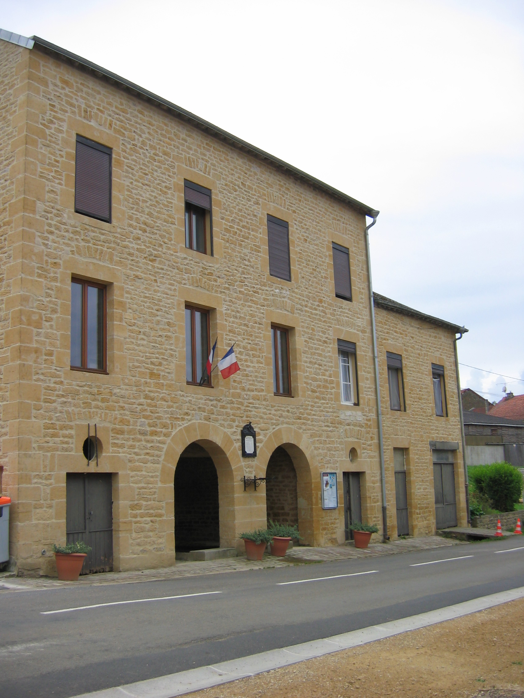 Mairie Amblimont Ardennes France